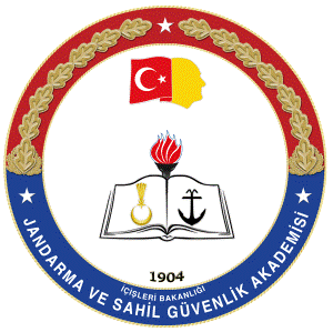 Jandarma ve Sahil Güvenlik Akademisi arması